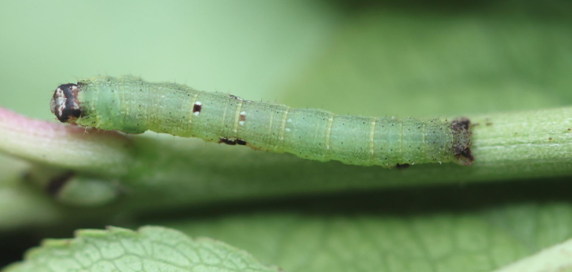 Jungraupe des Pfaffenhütchen-Harlekins (Ligdia adustata) am 2. Oktober 2019 südlich Mannheim